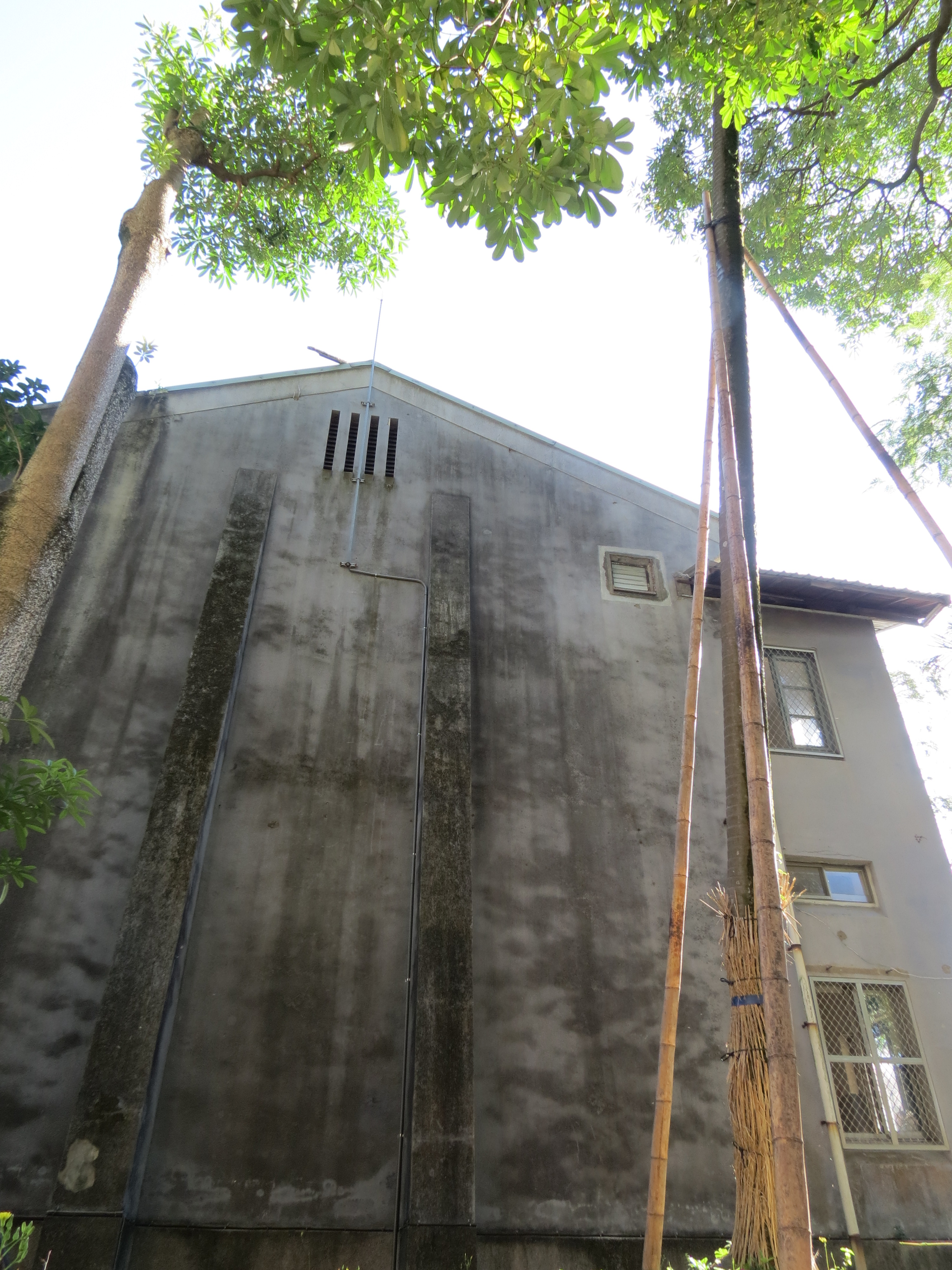 中文（台灣）: 台大舊機一景